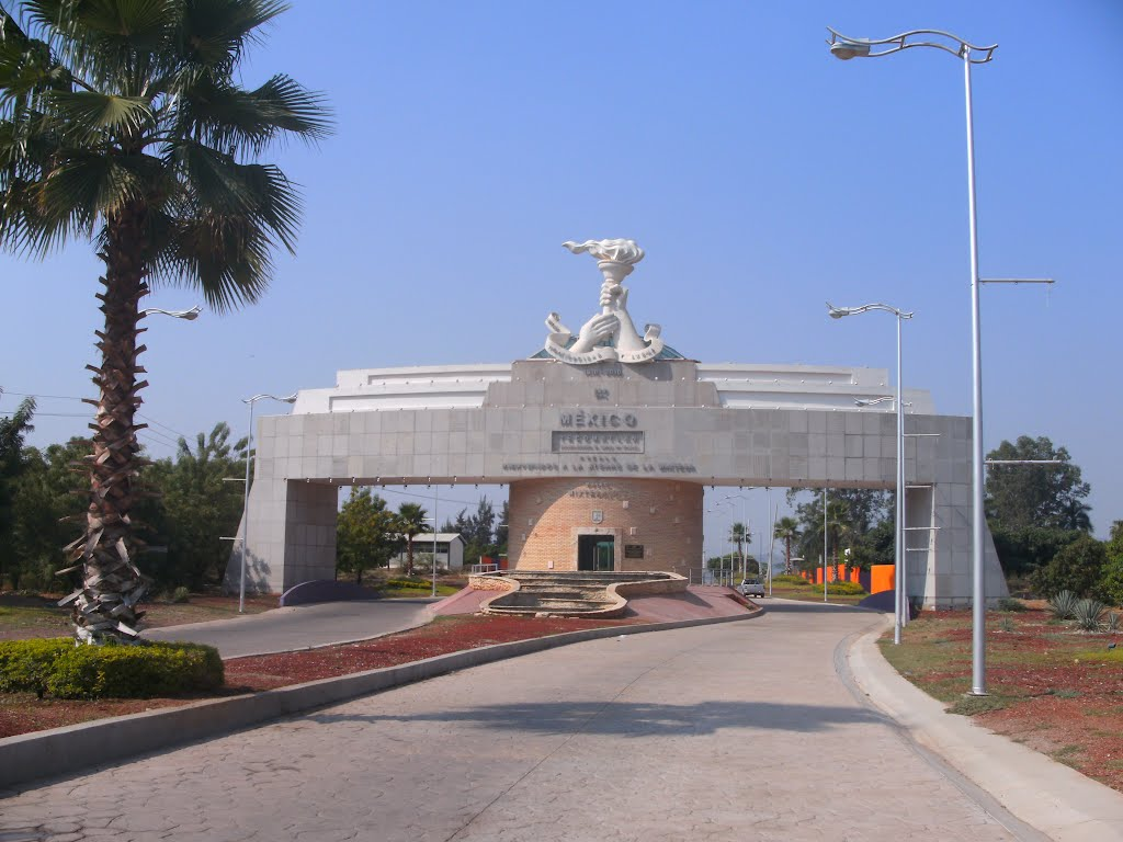 tecomatlan entrada